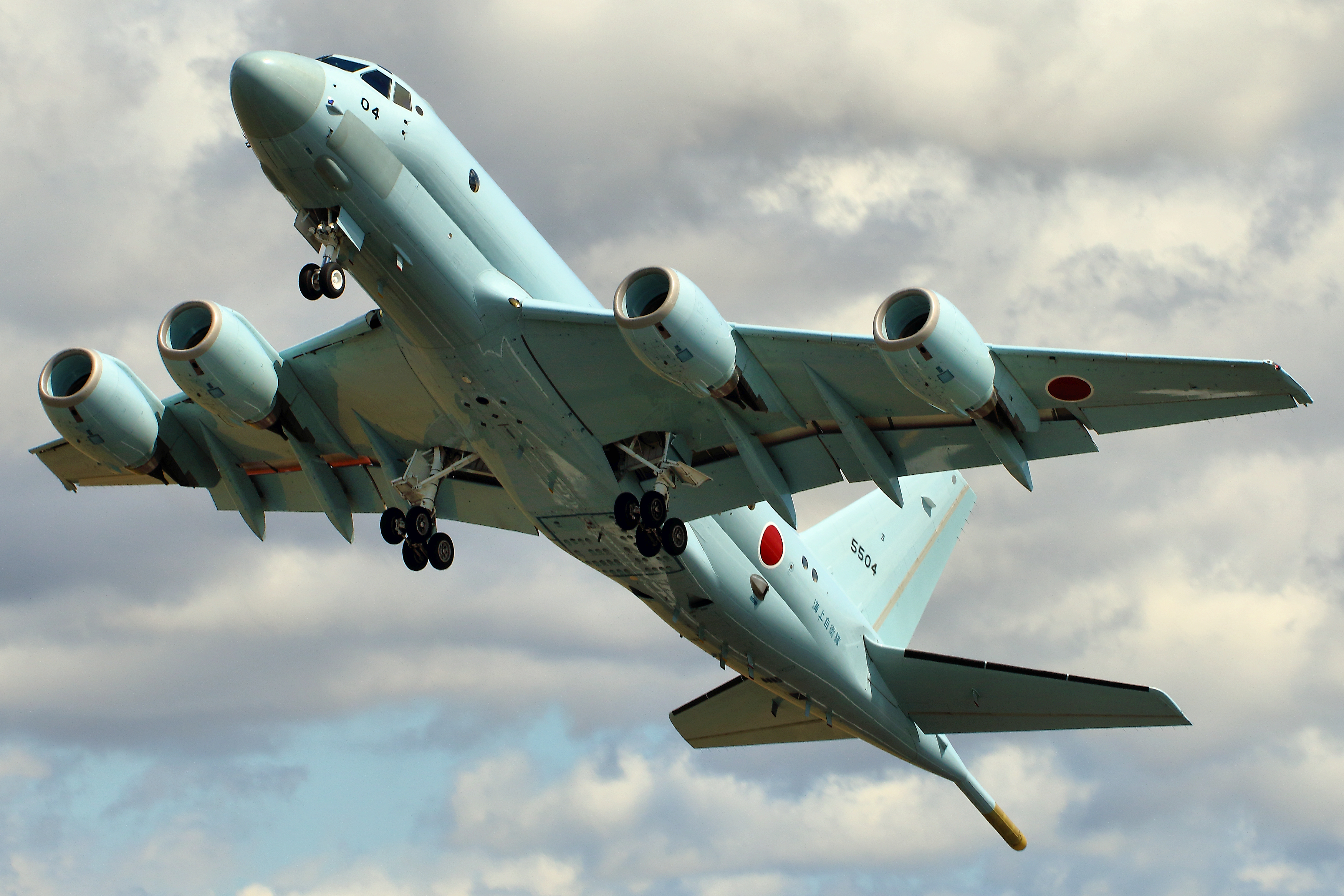 Kawasaki P1 - RIAT 2015